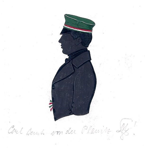 Schattenriss von Carl Bernhard Edlem von der Planitz